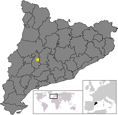 Localització de Tàrrega. Location of Tàrrega in Catalonia.